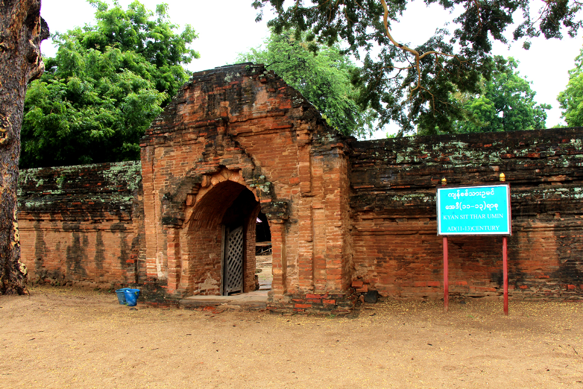 မြန်မာဘာသာ: ကျန်စစ်သားဥမင် အပြင်ဘက်